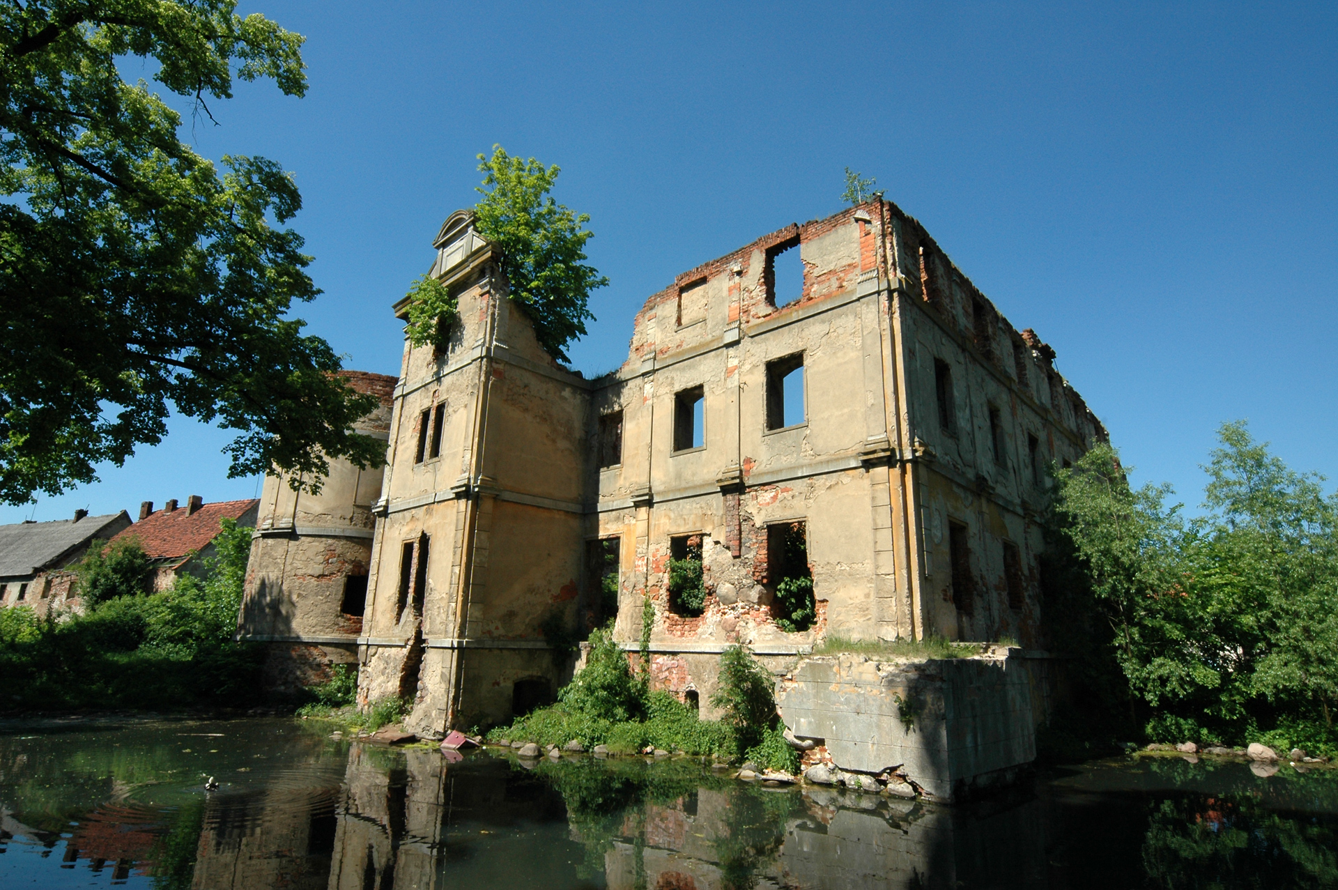 Pałac (ruina) Czernina, Pl. Zamkowy 1, Góra